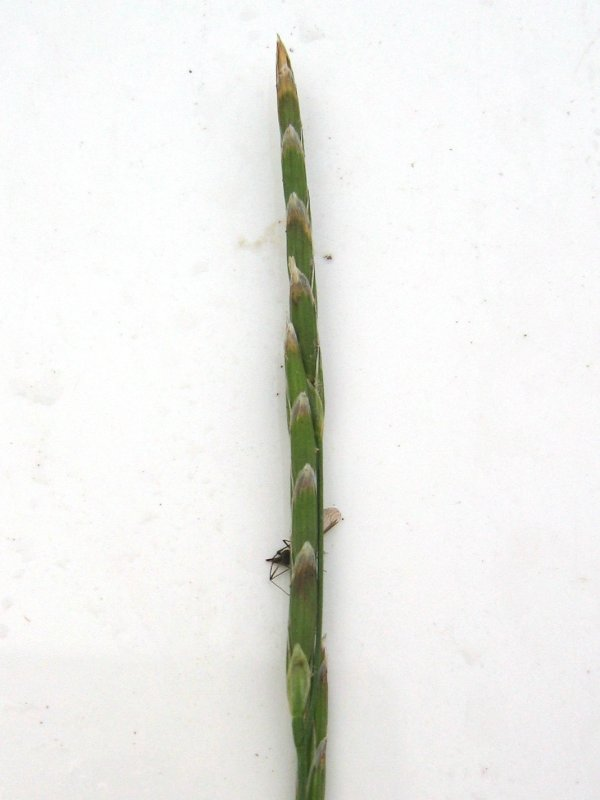 Flutender Schwaden Glyceria fluitans